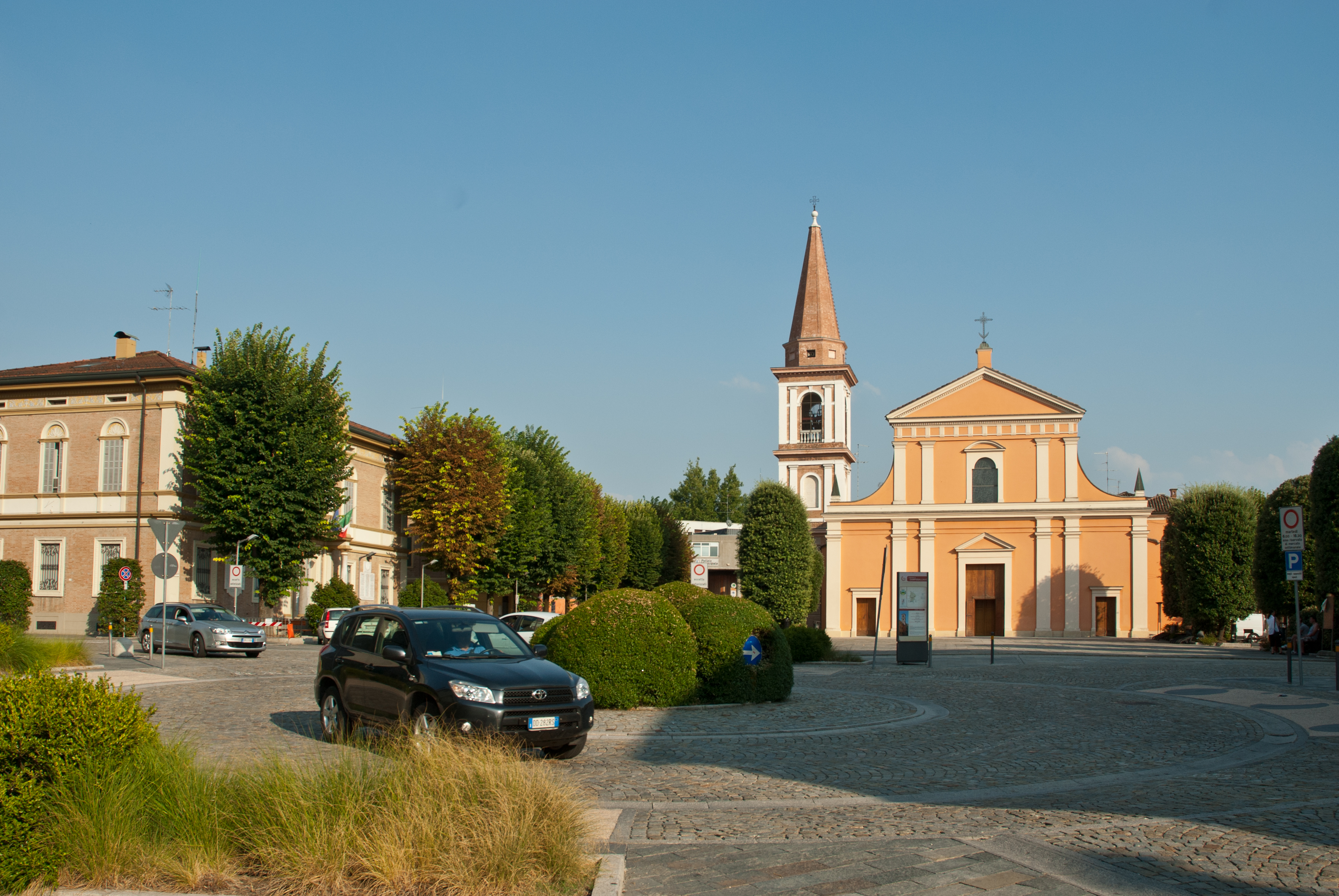 Nel centro di Campogalliano, a sinistra Municipio, a destra la Chiesa Sant' Orsola